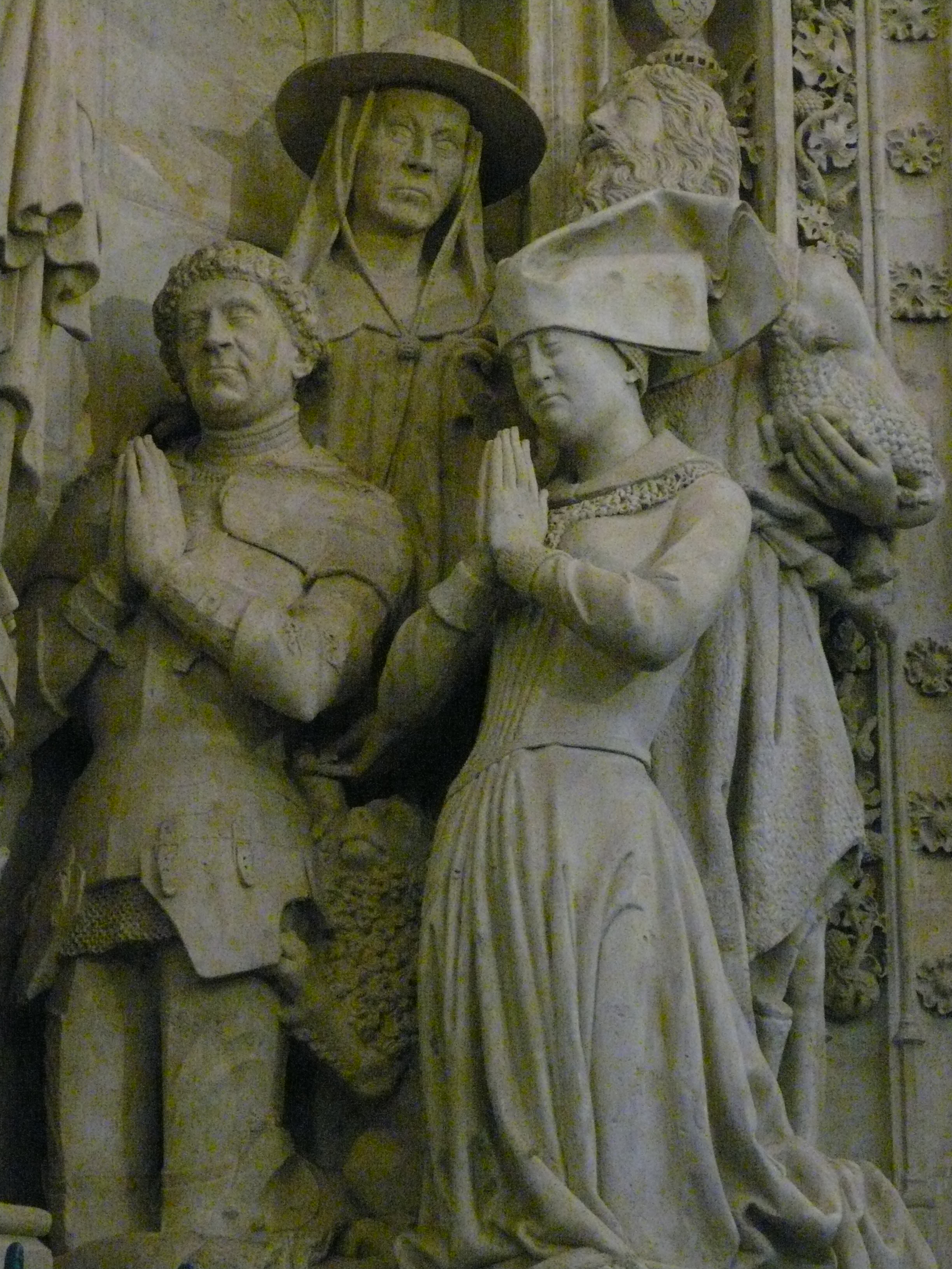 Praalgraf van Engelbrecht I van Nassau in de Grote Kerk Breda in Breda Centrum